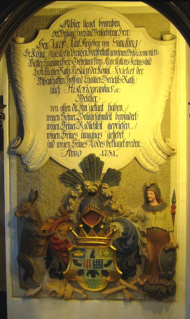 Gravestone of Jacob Paul von Gundling Text: (without "/" and with "ſ" replaced by "s") Alhier lieget begraben Der Weyland Hoch und Wohlgebohrene Herr Herr Jacob Paul Frey=Herr von Gundling Sr. Königl. Majestaet in Preußen Hochbestalt gewesenen Ober=Ceremonien= MeisterChammerHerr Geheimer=Ober=Appellations=Kriegs=und Hoff=Chammer=Rath Praesident der Königl. Societaet der Wißenschafften Hoff= und Chammer=Gerichts=Rath auch Historiographicus etc. : Welcher von allen die Ihn gekant haben wegen Seiner Gelahrsamkeit bewundert wegen Seiner Redlichkeit gevriesen wegen seines umgangs geliebet und wegen Seines Todes beklaget worden. Anno 1731.